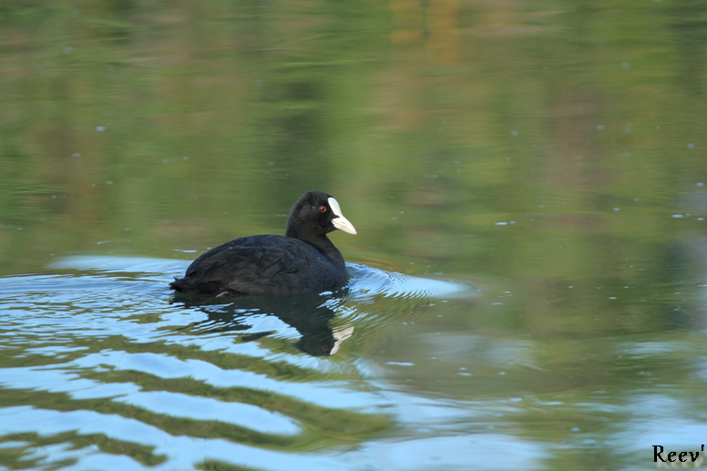 Foulque macroule pris en photo à proximité du Cabanon du Rendez-vous dans la Réserve Naturelle des Marais du Vigueirat en Octobre 2013.